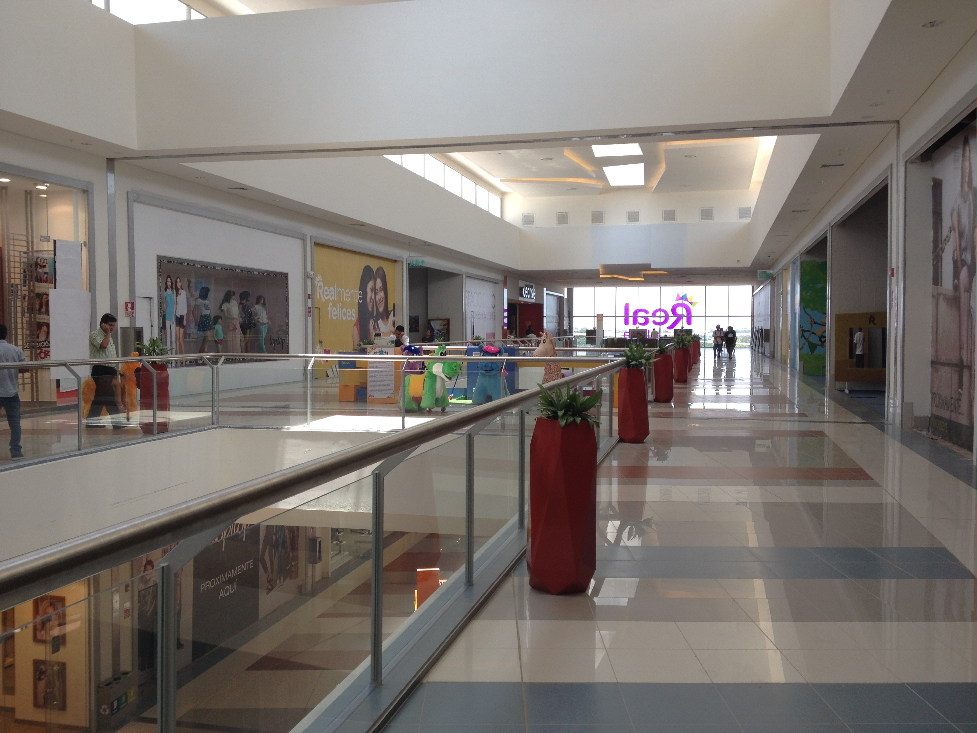 Vistazo del C.C. Real Plaza en Pucallpa, Perú. Se muestra los interiores del lugar, abierto al público.